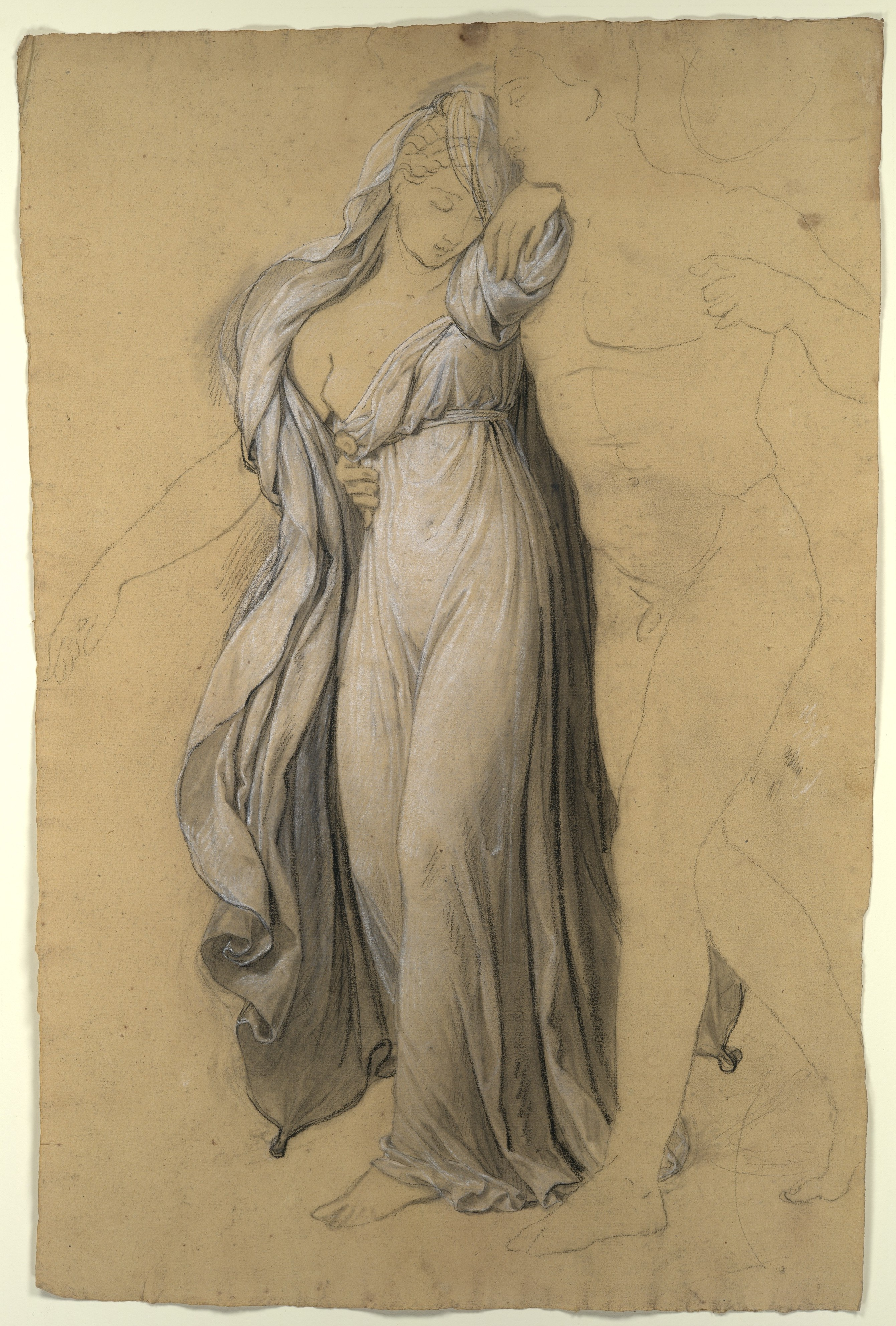 Drawing; Drawings